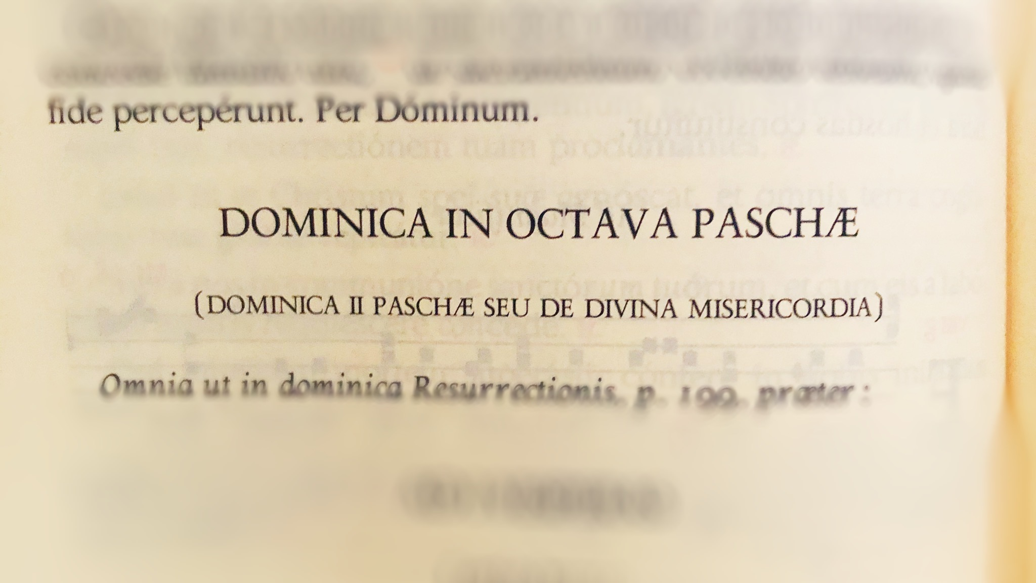 Beginning of the celebration of the first Sunday after Easter from Antifonale romano II